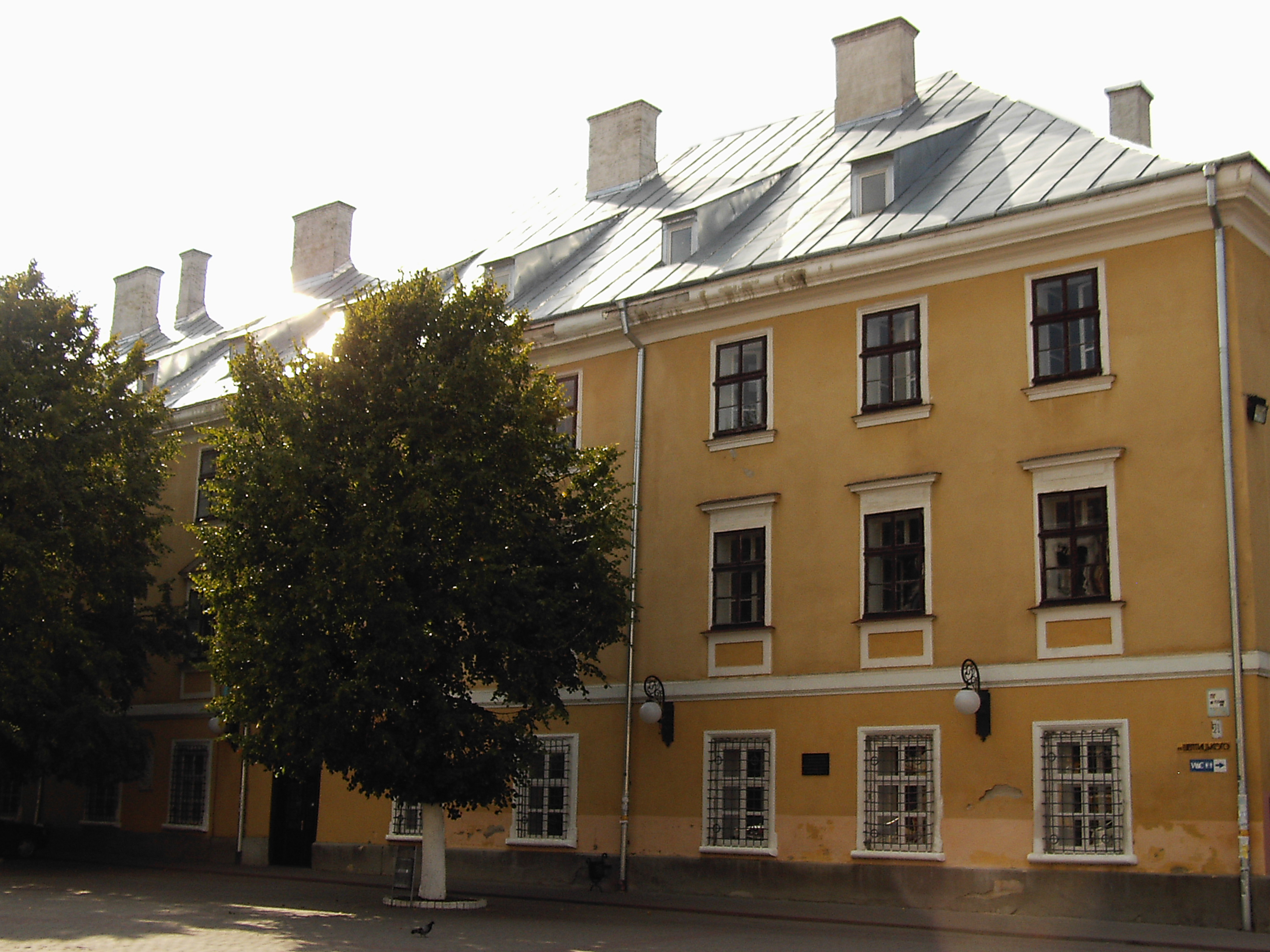 Івано-Франківський Національний Медичний Університет. Морфологічний Корпус. м. Івано-Франківськ-1